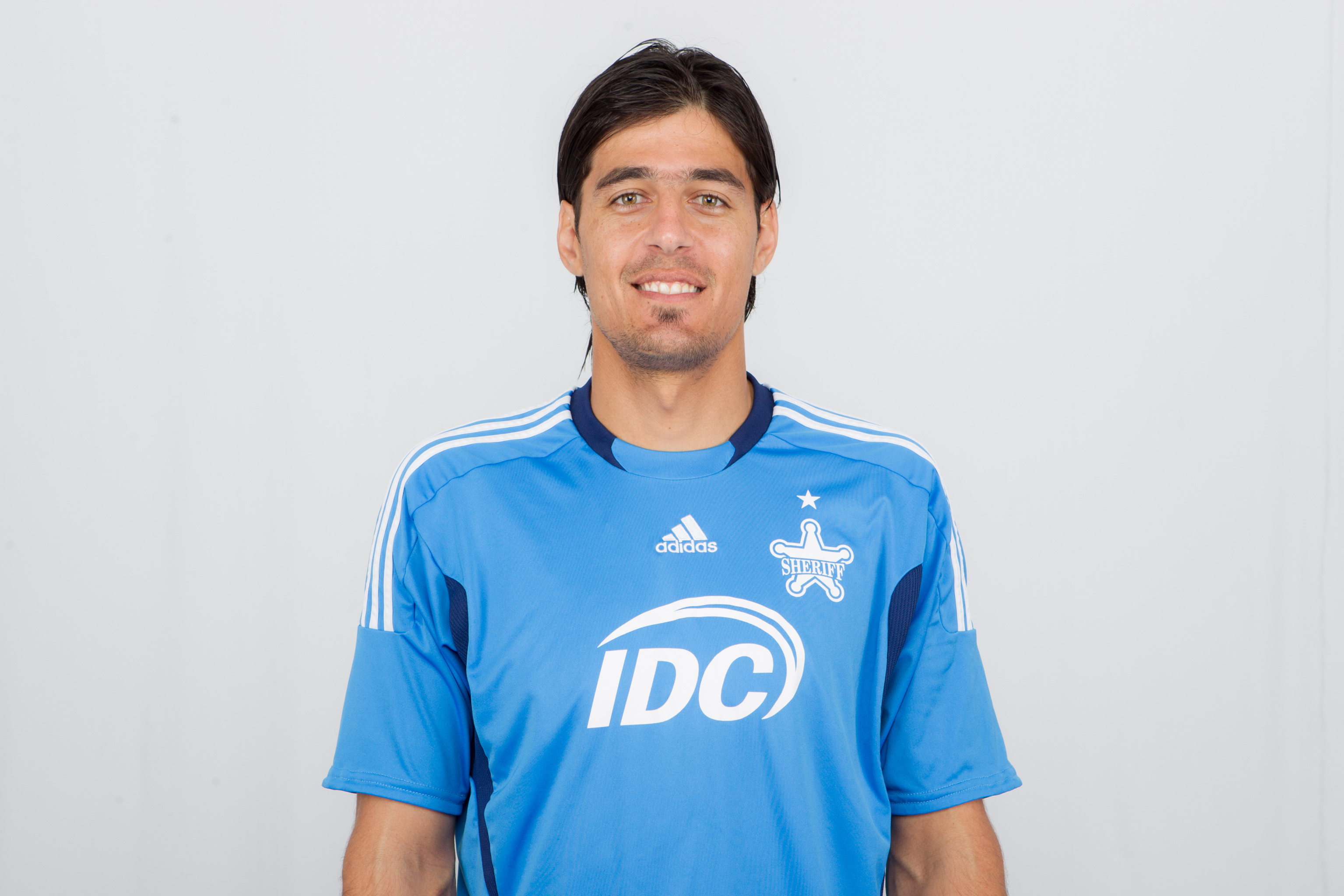 Матиас Дегра — аргентинский футболист